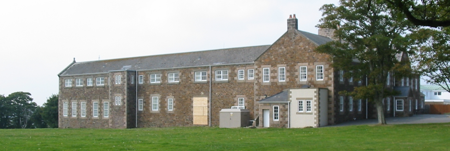 Nrf: Jèrri